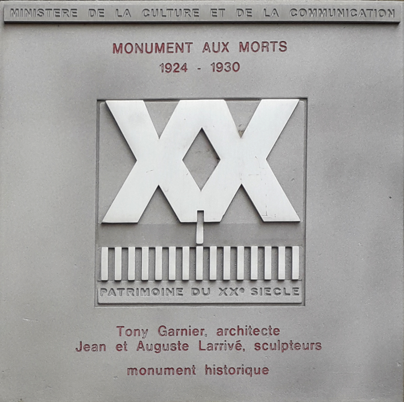 Inscription du Ministère de la culture et de la communication : Monument aux morts 1924 - 1230. Tony Garnier, architecte, Jean et Auguste Larrivé, sculpteurs, monument historique